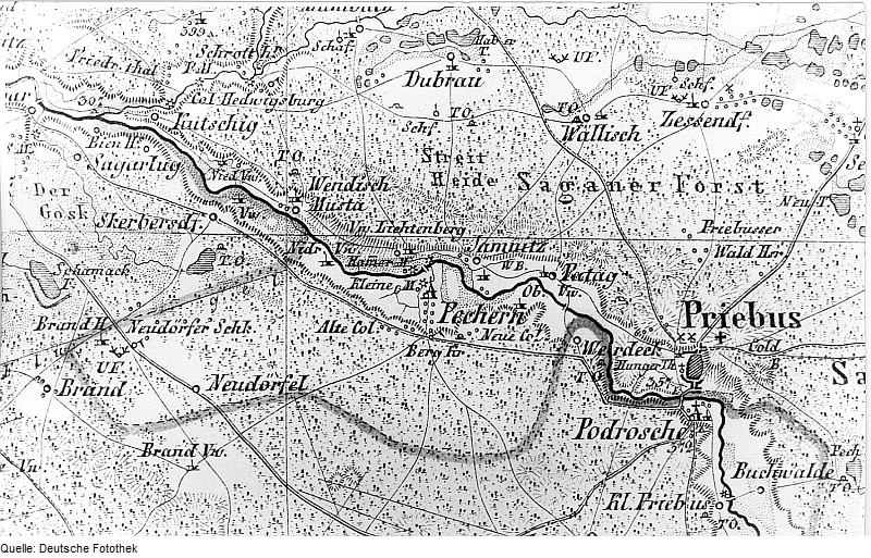 Original image description from the Deutsche Fotothek Krauschwitz-Pechern. Atlas von Schlesien, Kreis Rothenburg, Verlag C. Flemming/Glogau, um 1850